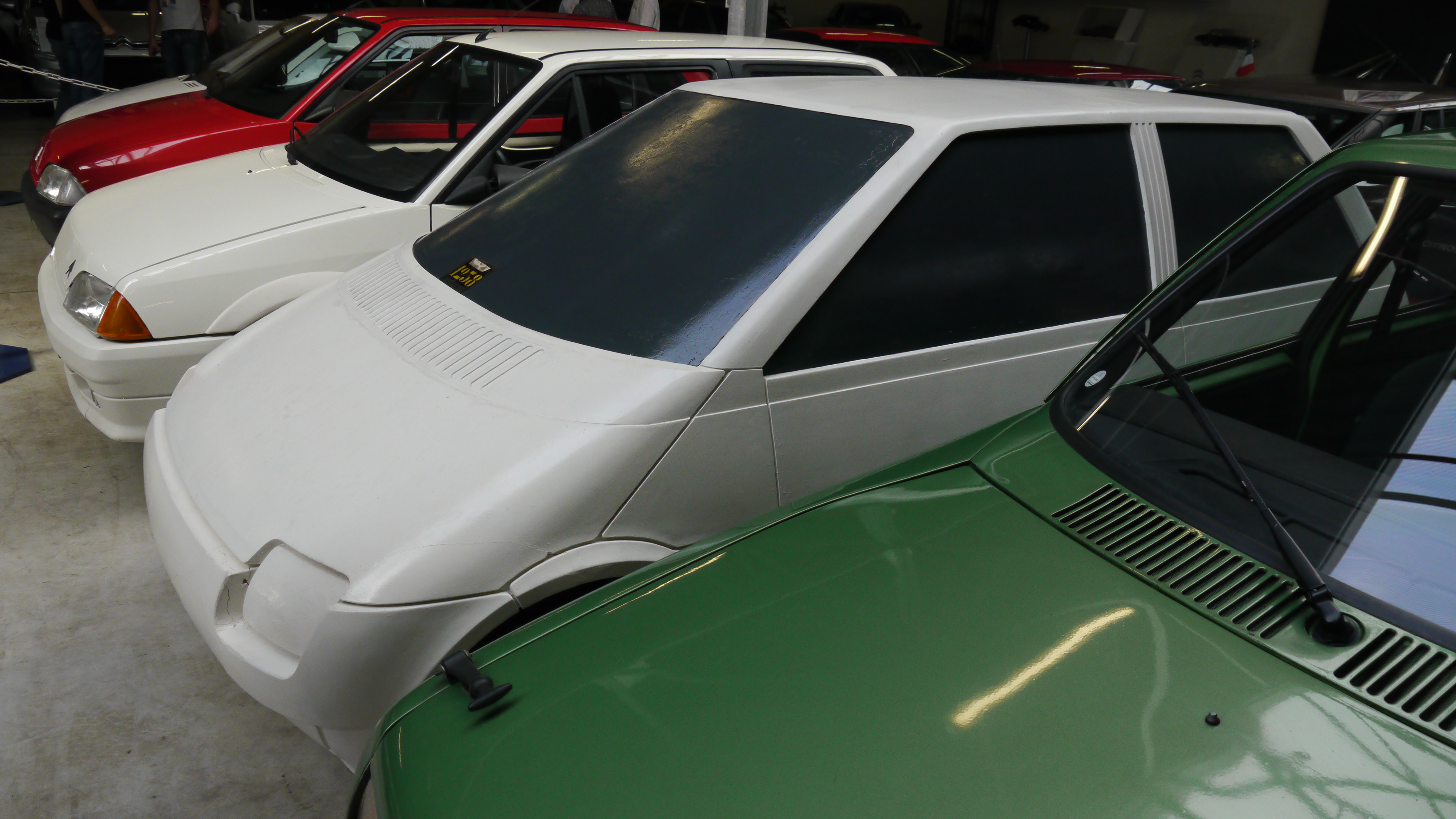 Conservatoire Citroen 263 Citroen AX